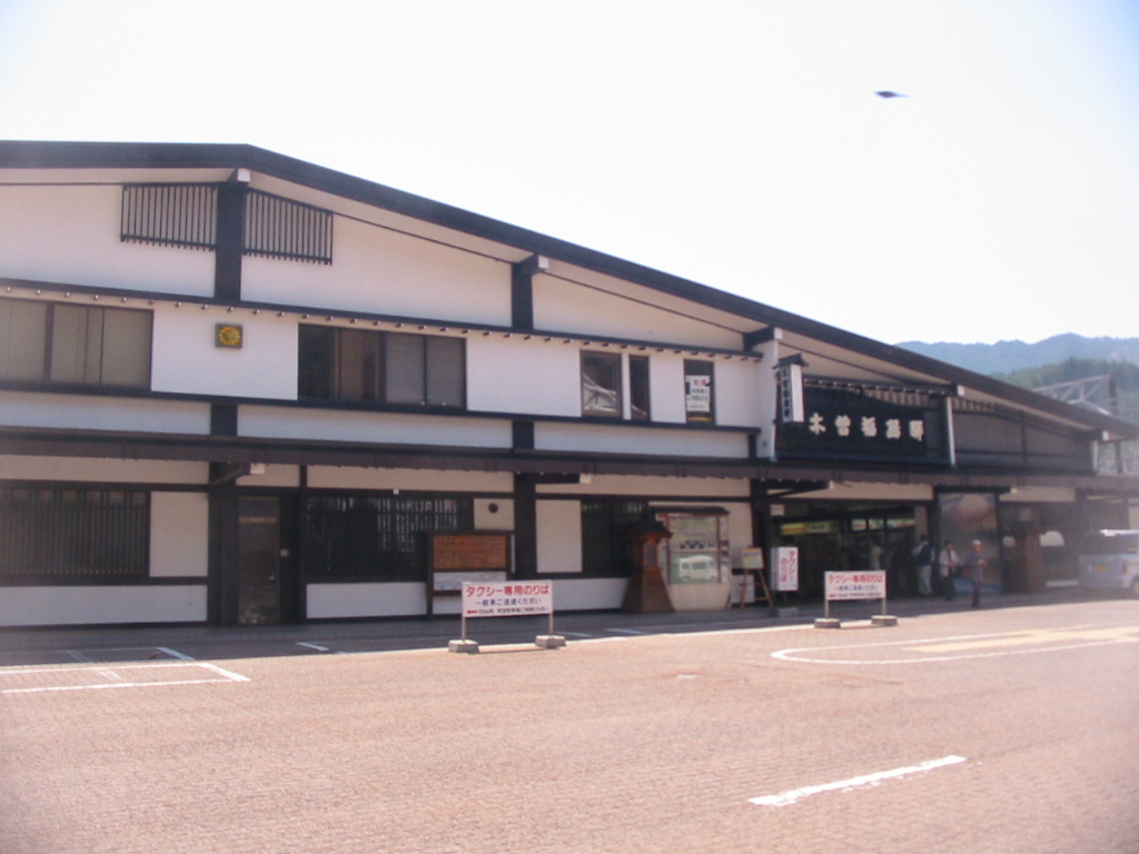 JR中央線木曽福島駅